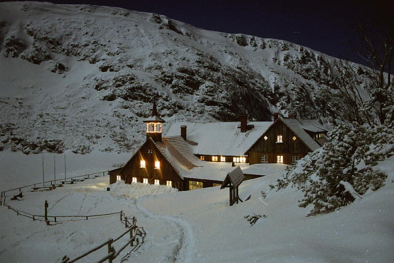 Schronisko Samotnia, Karkonosze Mountains, Poland